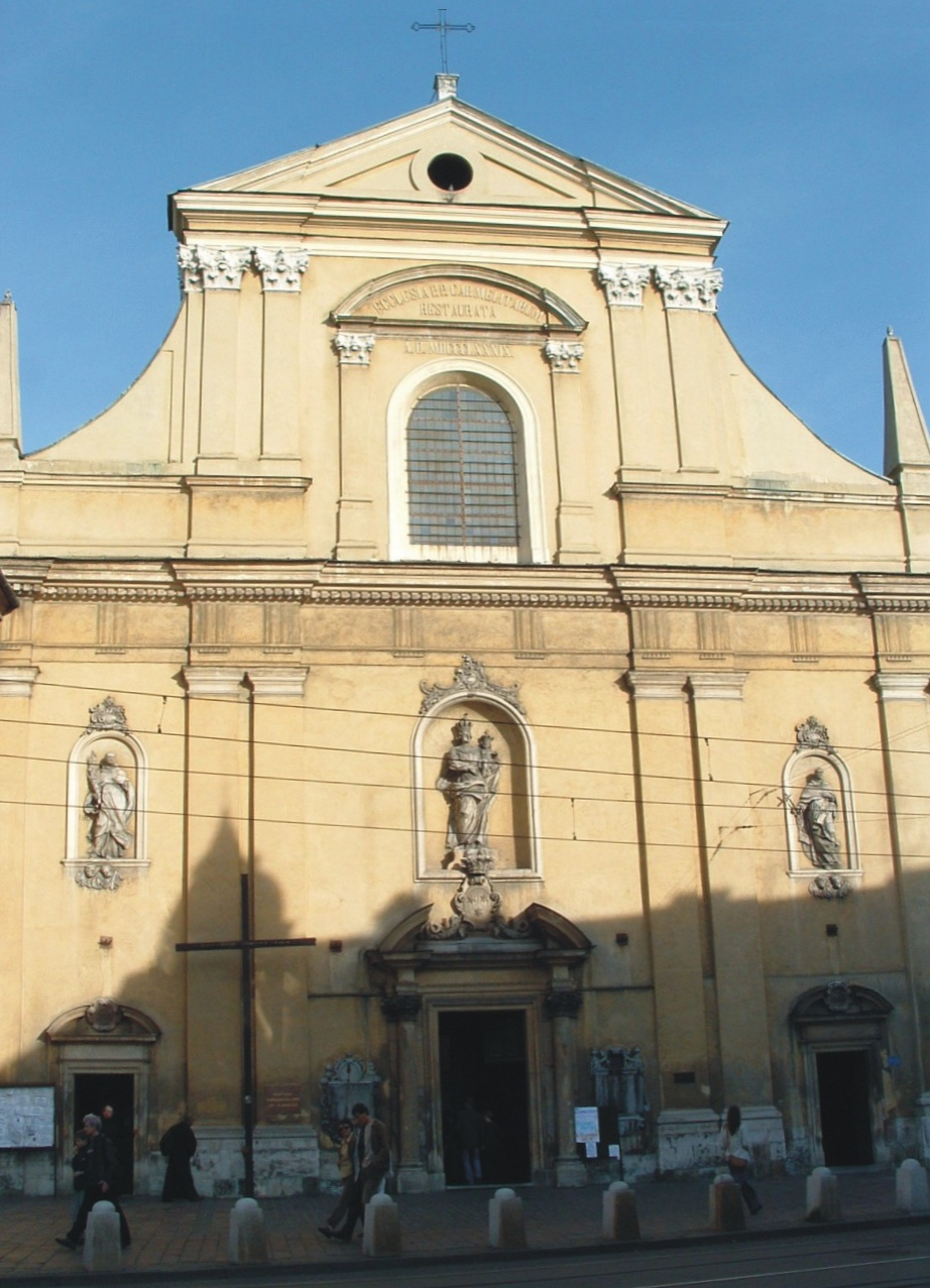 Bazylika o. Karmelitów w Krakowie